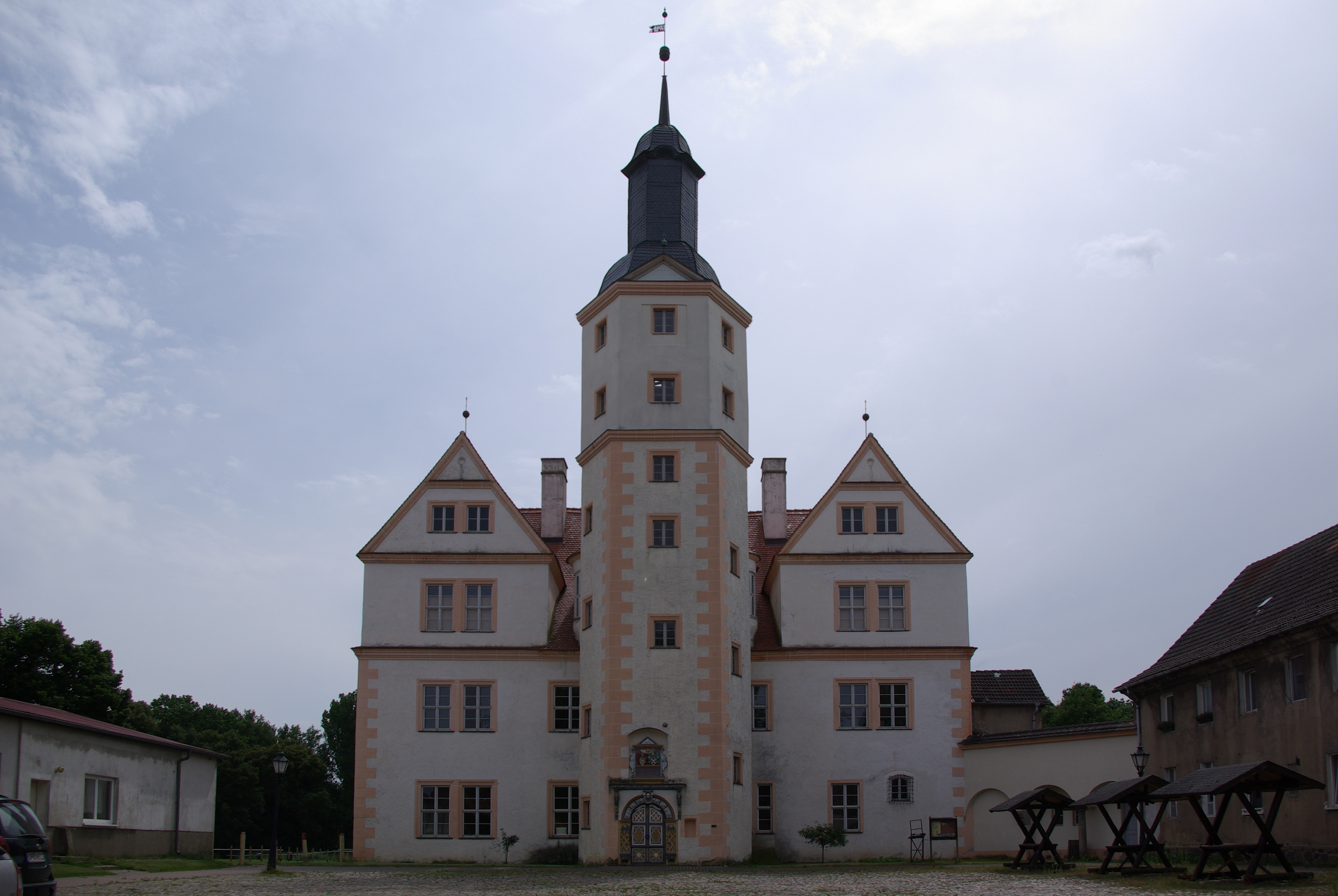 Gumtow, Ortsteil Demerthin in Brandenburg. Das Schloss steht unter Denkmalschutz.